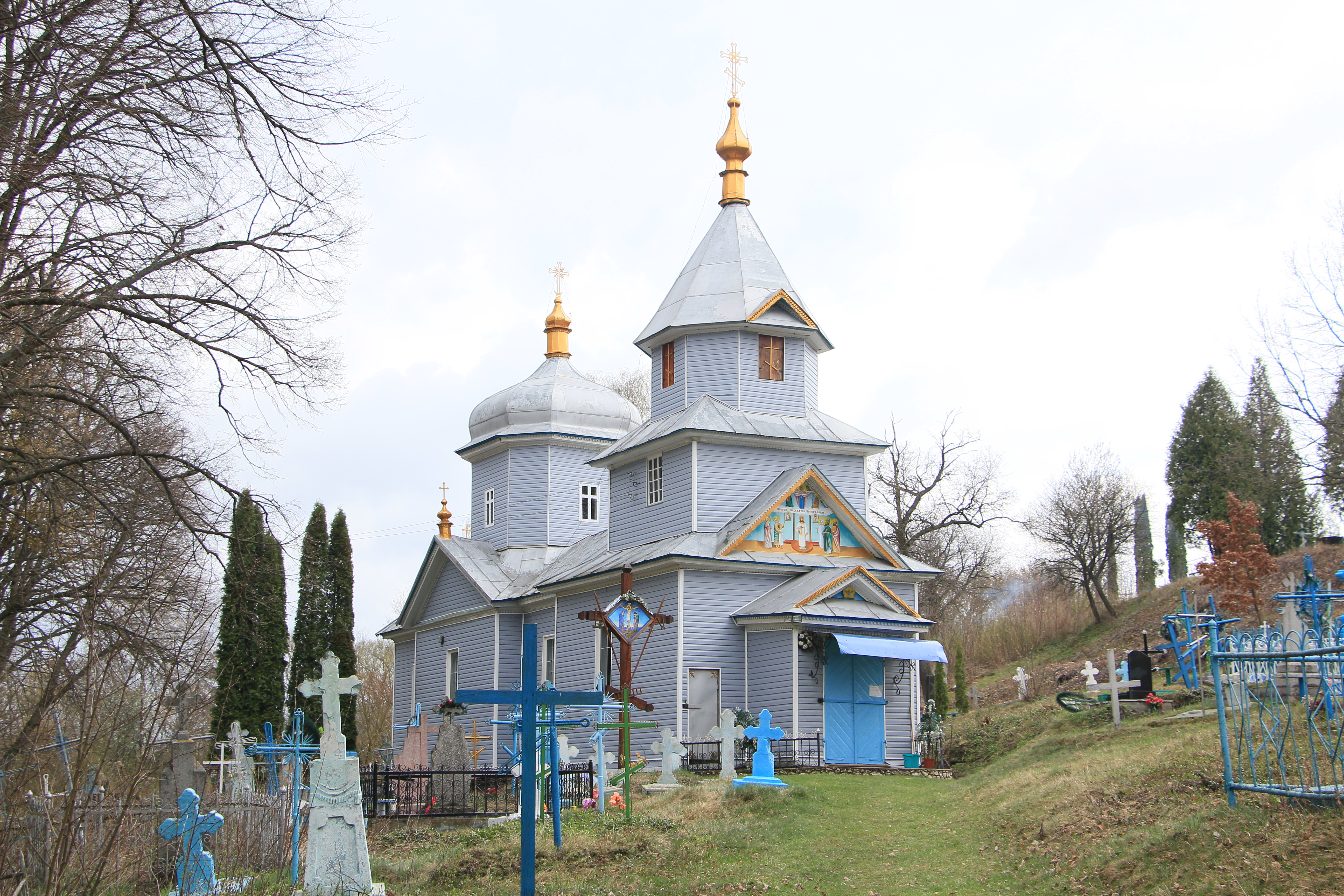 Дерев'яна церква в селі Новосілка Шумського району Тернопільської області